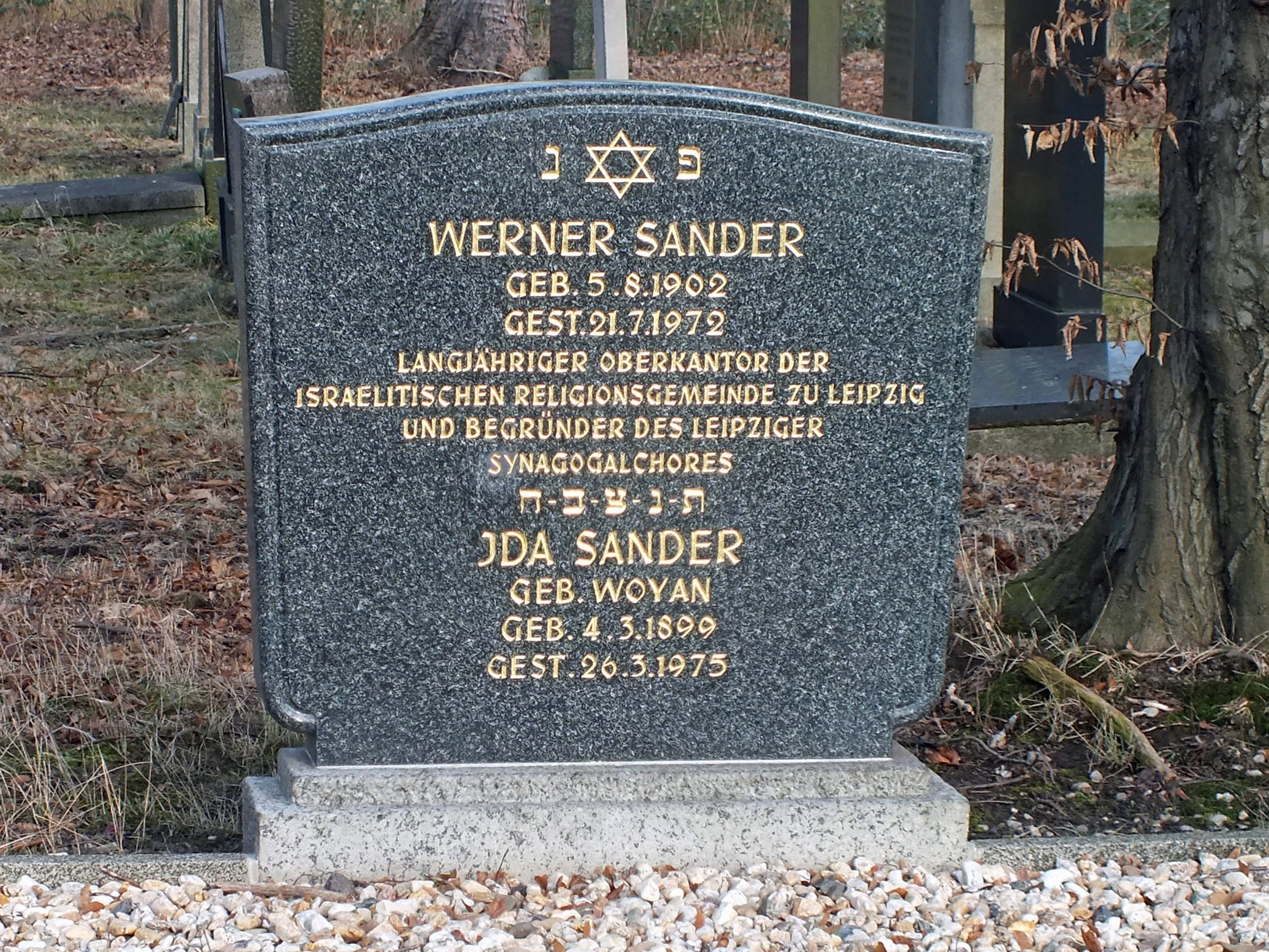 Neuer Israelitischer Friedhof in Leipzig. Grabstelle Werner Sander.